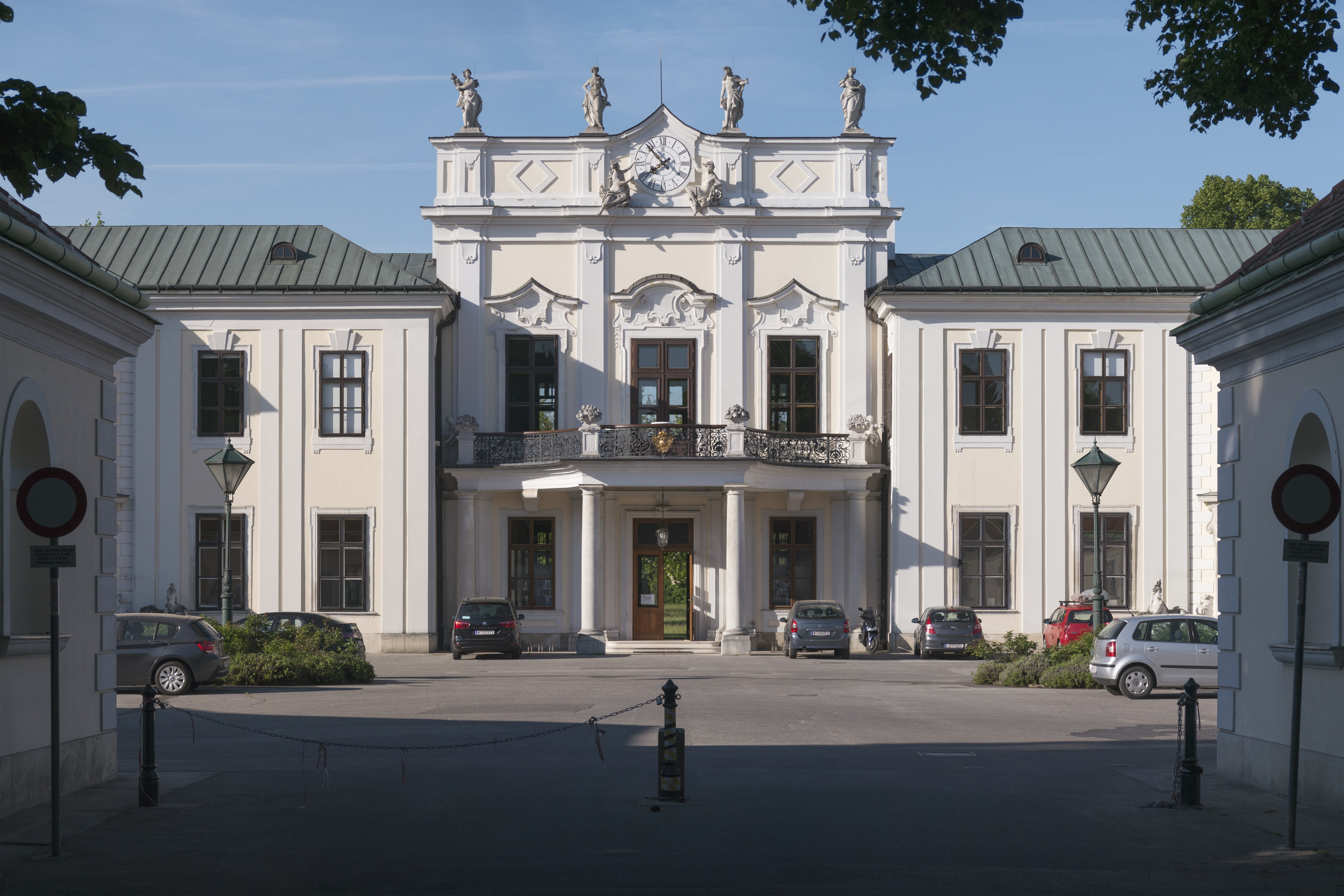 Schlossanlage Hetzendorf, Modeschule